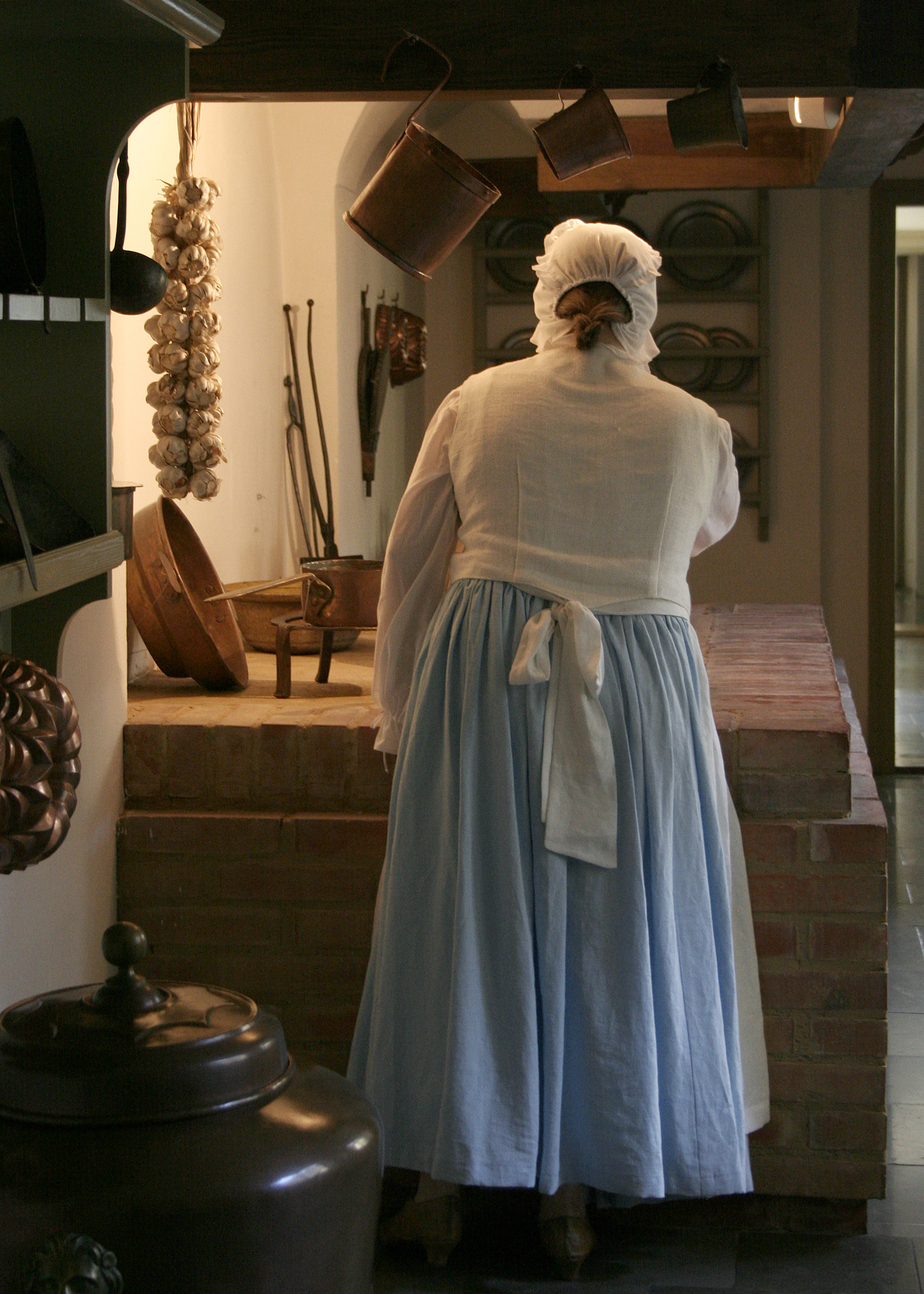 Fragment kuchni z paleniskiem o otwartym ogniu. Fot. Ewa Grela, zbiory Muzeum Gdańska